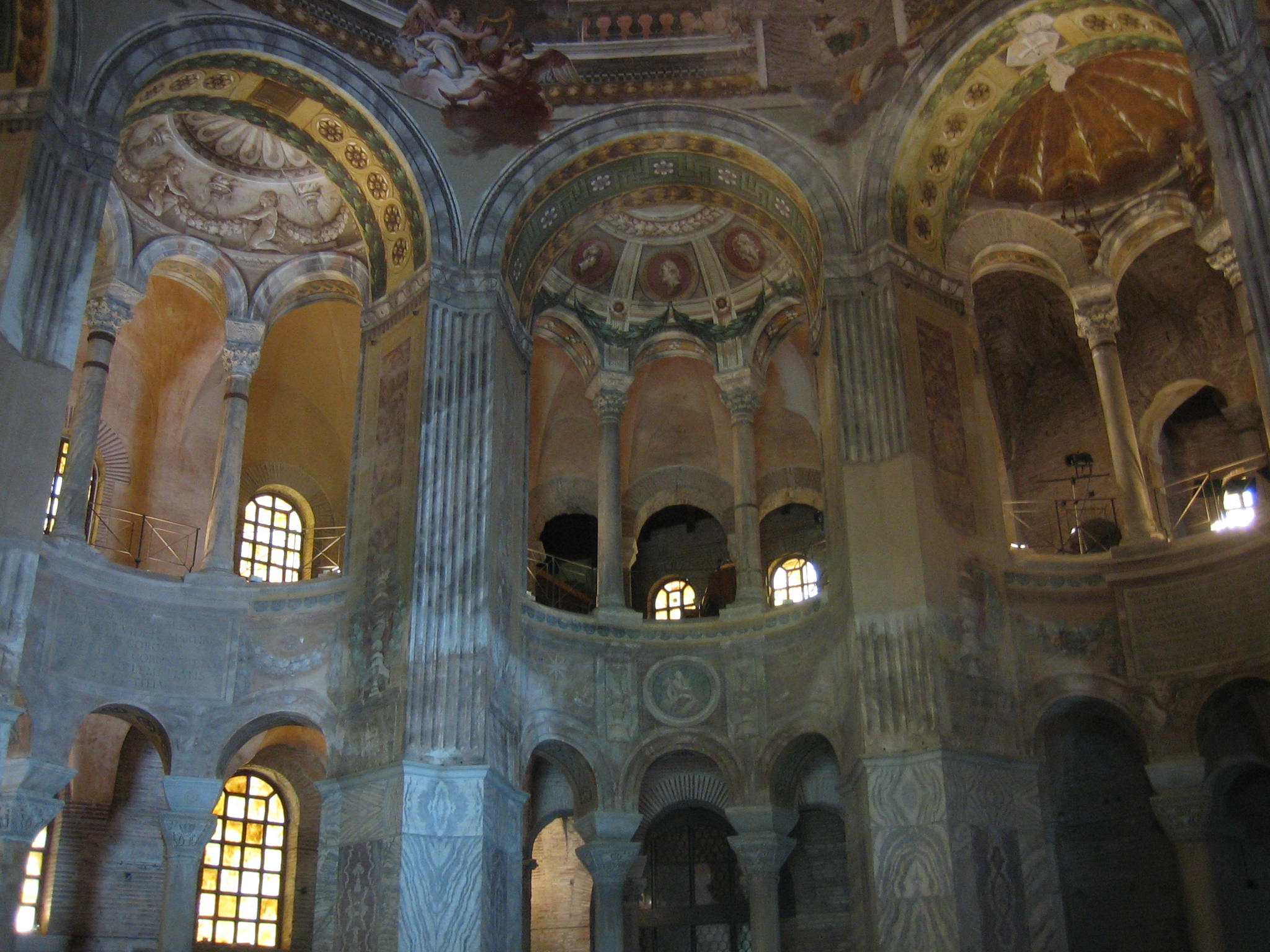 Innenraum von San Vitale in Ravenna